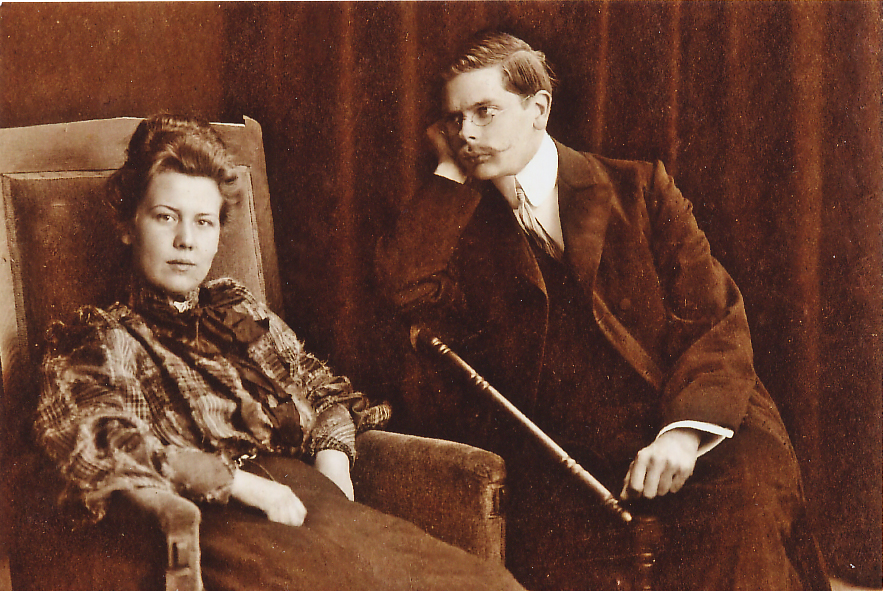 Portret van Willy & Adolf Pétillon, ca. 1910